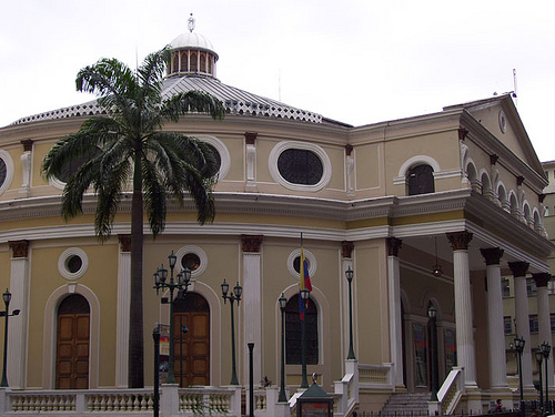 Luego de la restauración